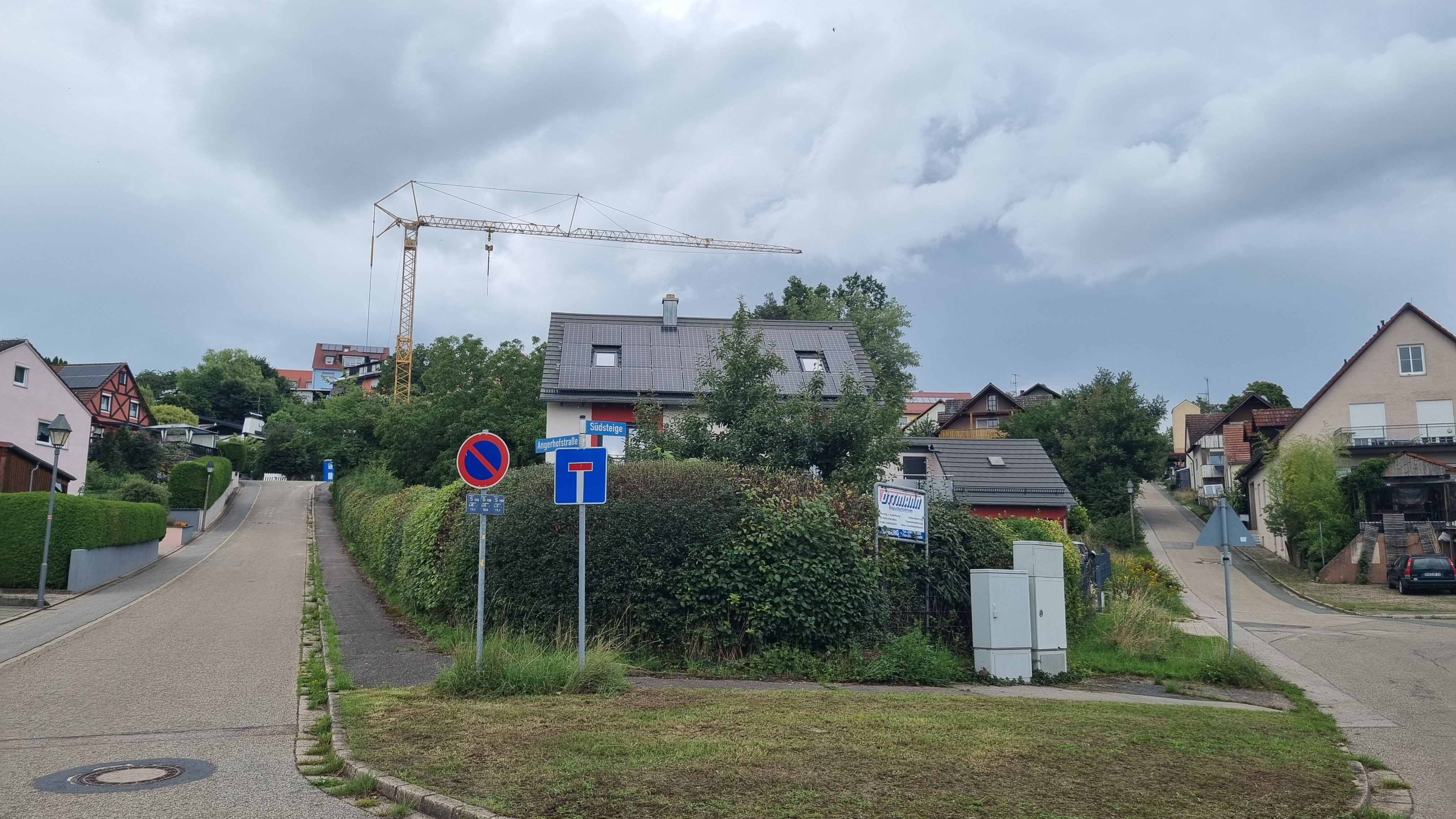 Der Angerhof, munich, near Marienplatz. The glowing facade gives a unique character to the property of the Wöhr+Bauer GmbH. Building an sorroundings as an art space.